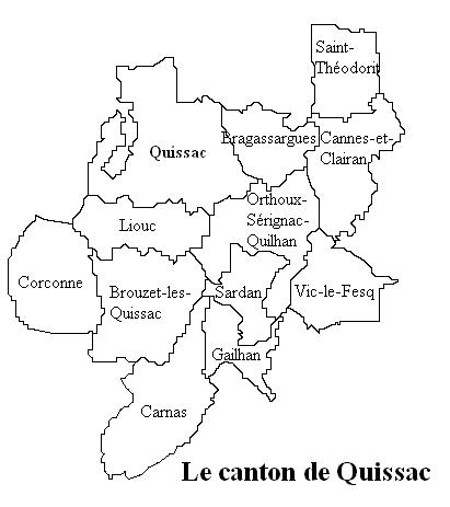 Le canton de Quissac Image personnelle